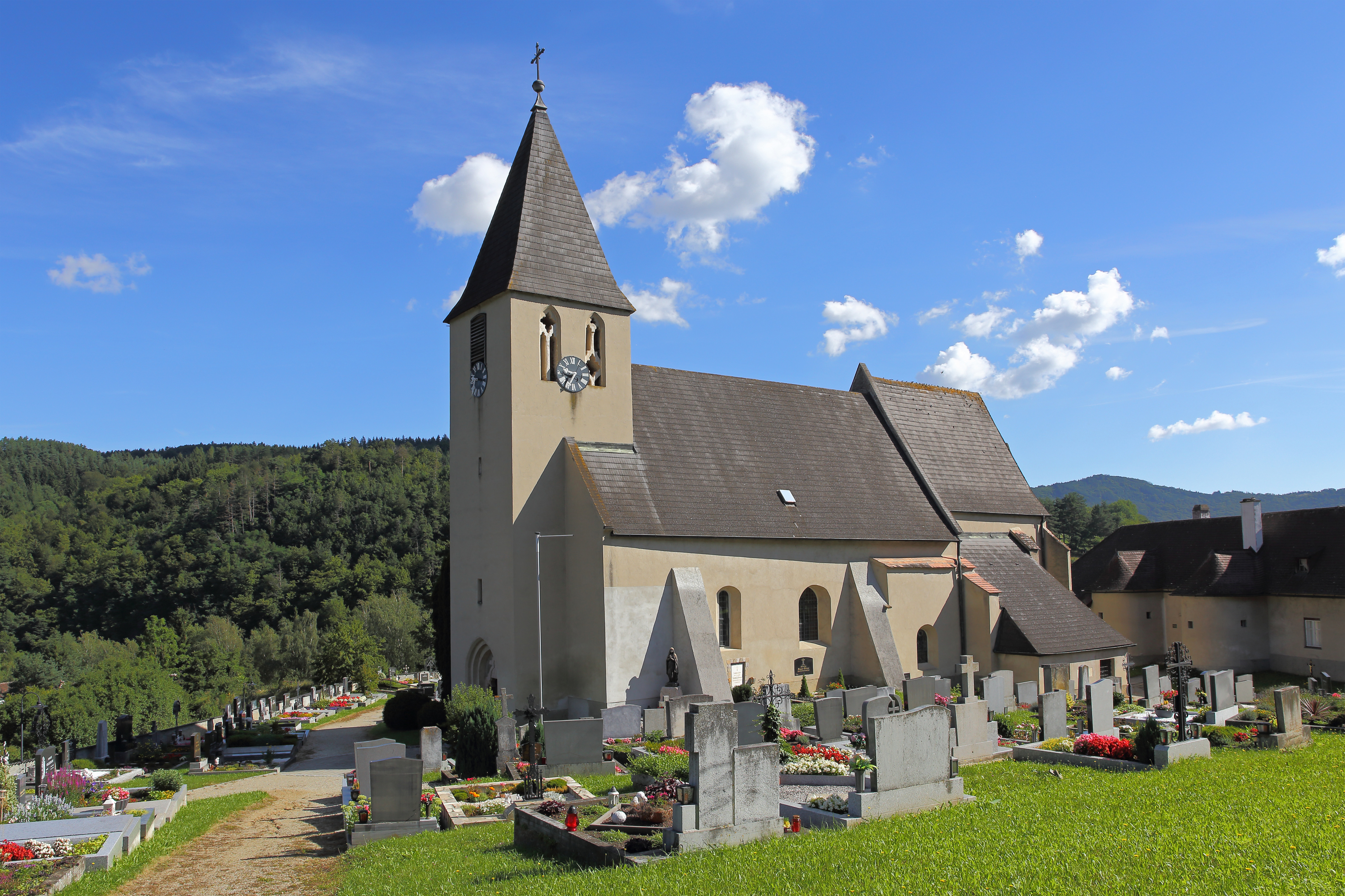 Kath. Pfarrkirche hl. Stephan und Friedhof in Obermeisling (Gemeinde Gföhl)